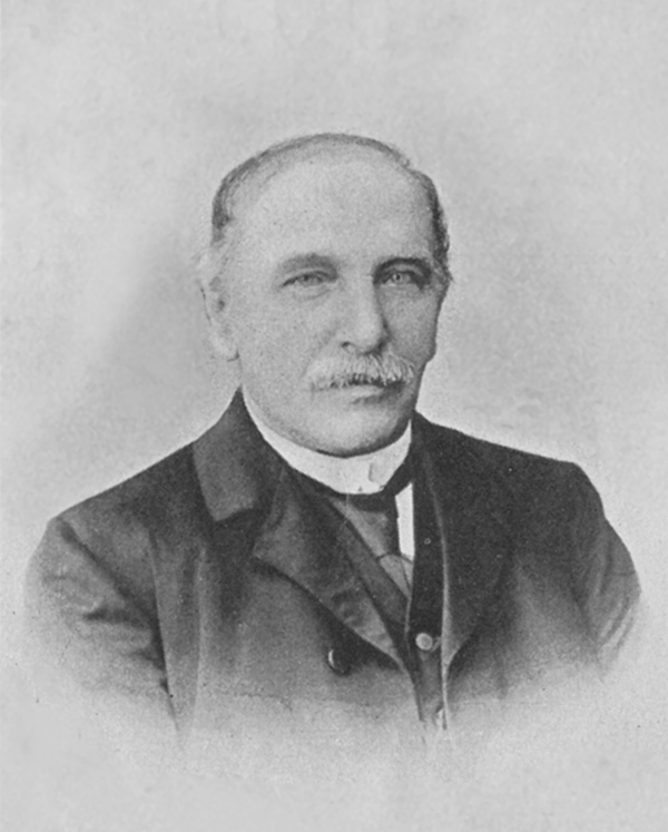 Karl Strosser, Vorsitzender der “Christlichen Konservativen Partei Minden-Ravensberg”